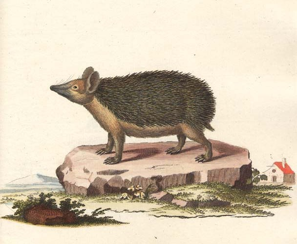 Hemiechinus auritus, plate from Schreber, Johann Christian Daniel von, Histoire naturelle des quadrupèdes représentés d´après nature. Tome III. Le phoque, le chien, le chat, le putois, la loutre, la marte, l'ours, le didelphe, la taupe, la souris, le hérisson A Erlang, chez Wolfgang Walther, 1780